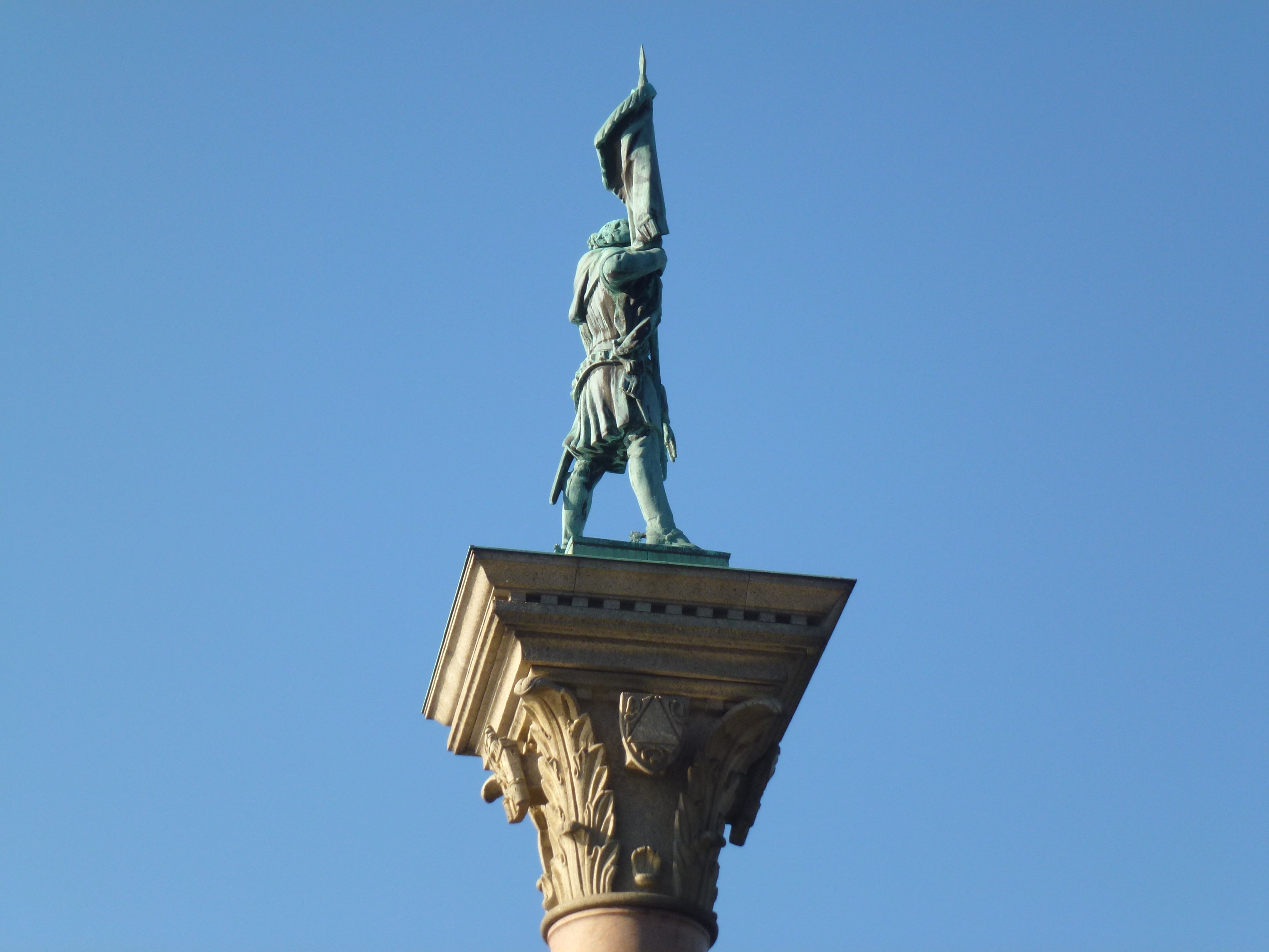 Engelbrekstatyn, Engelbrekt och kapitälet